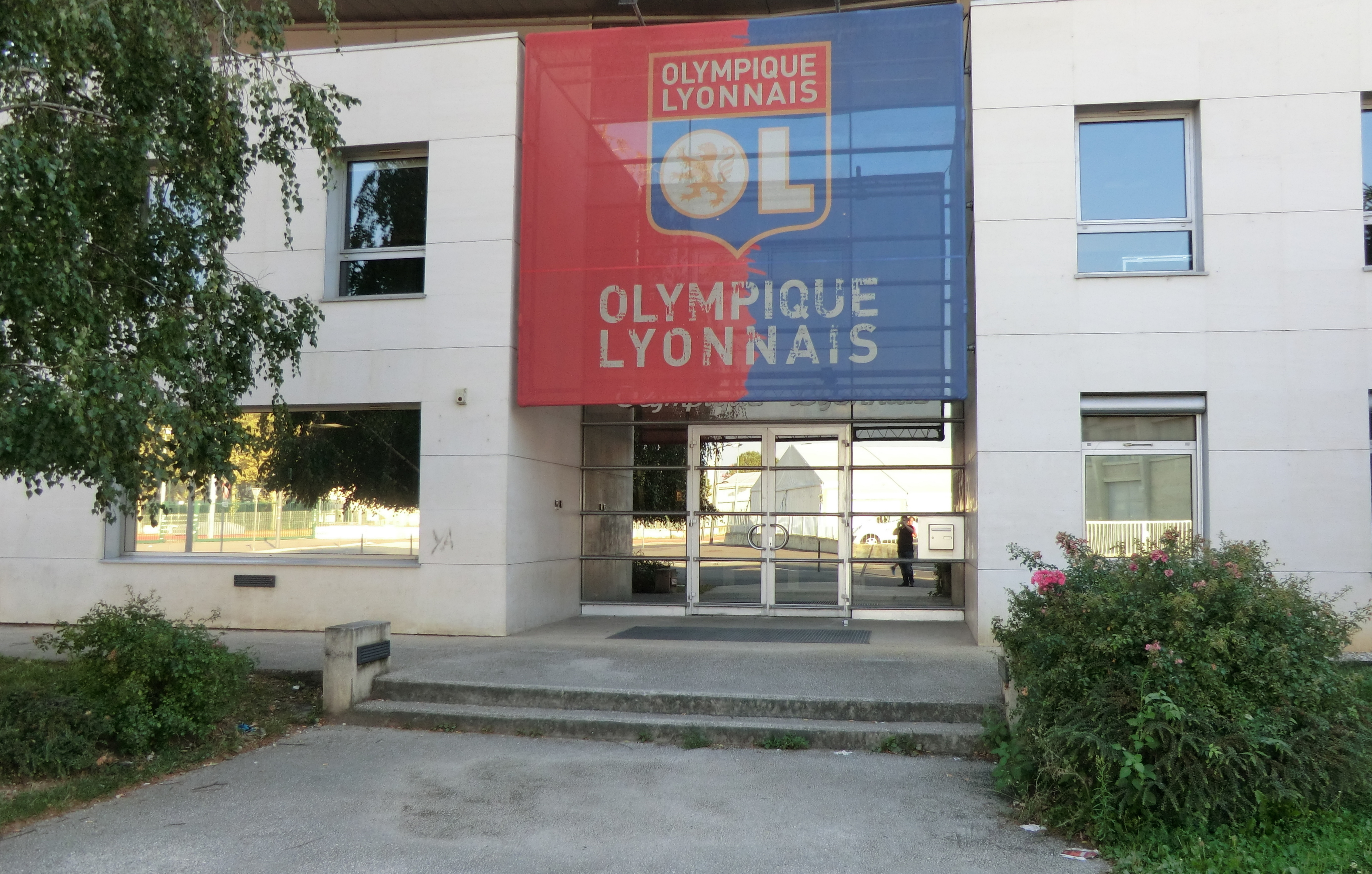 Entrée du bâtiment du centre Tola-Vologe.